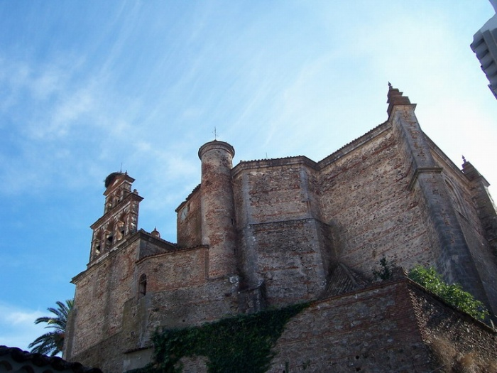 Fachada trasera